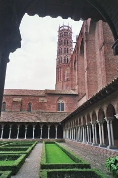 Toulouse: Les Jacobins, claustro